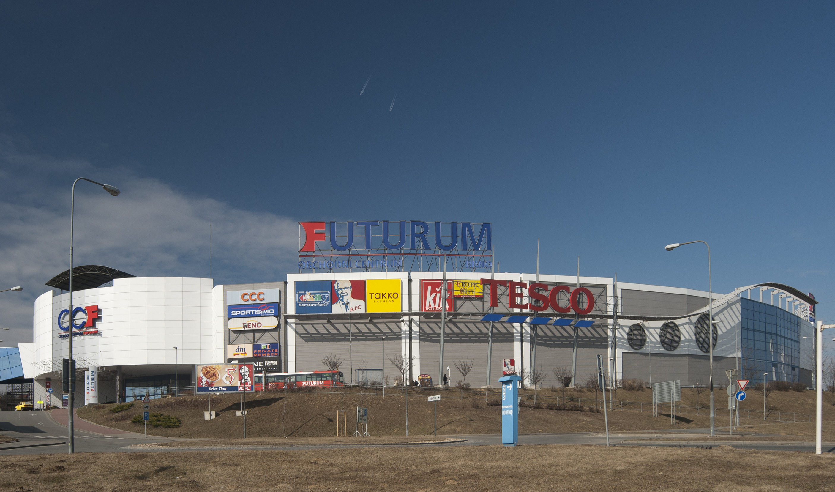 Brno-Dolní Heršpice - obchodní centrum Futurum vyfotografované od východu